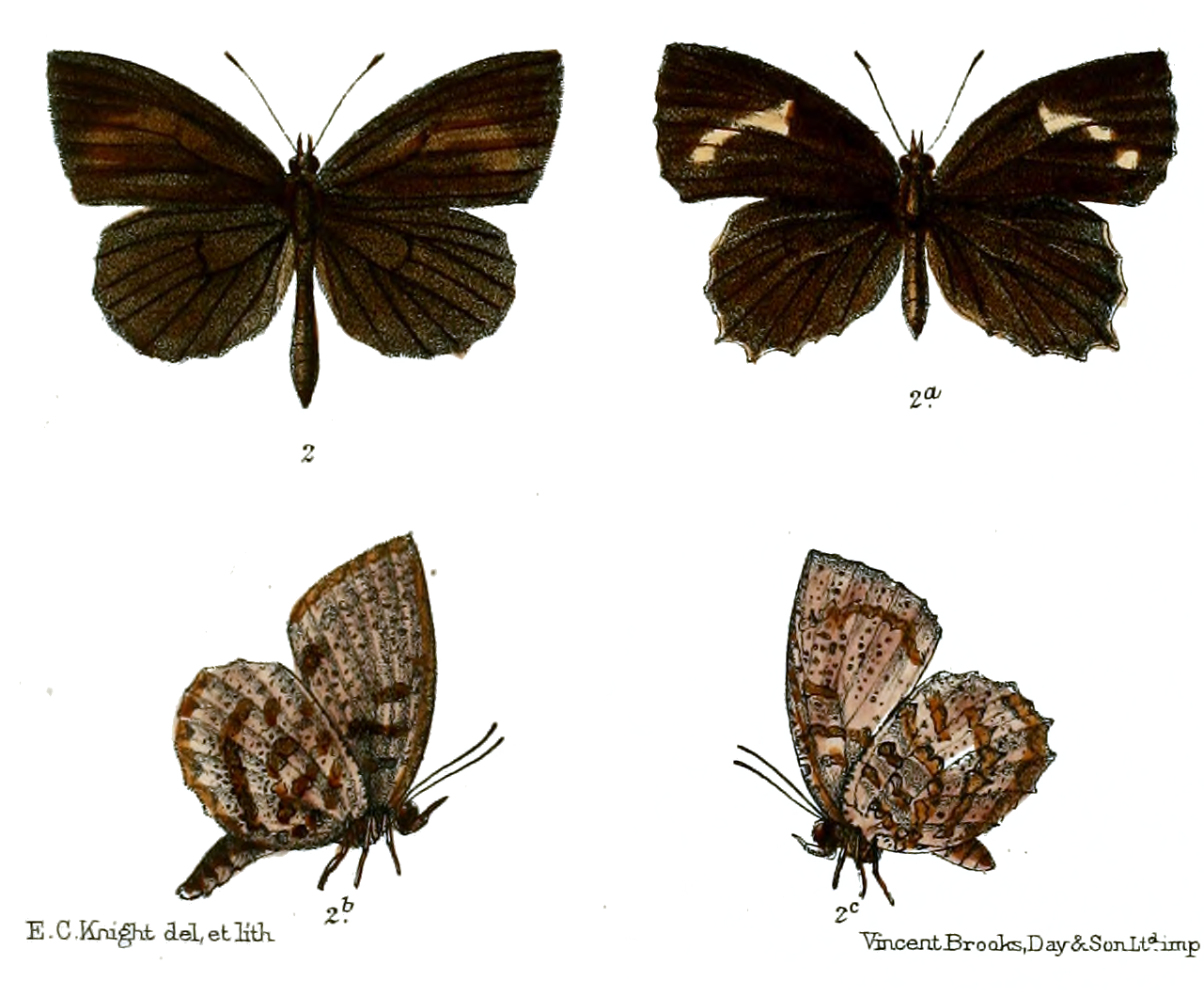 Allotinus multistrigatus